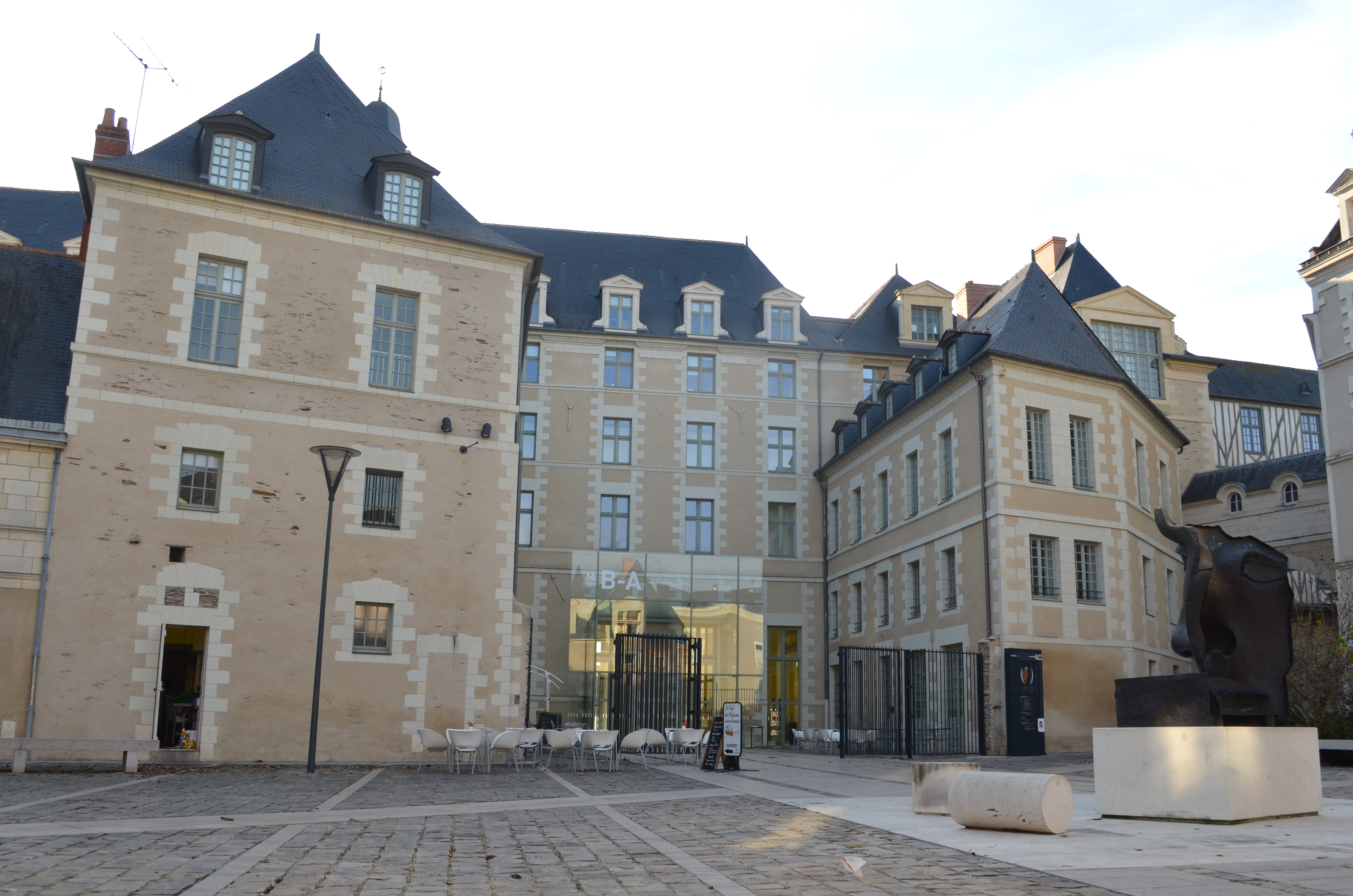 Logis Barrault, actuel musée des beaux-arts - Angers (Maine-et-Loire)